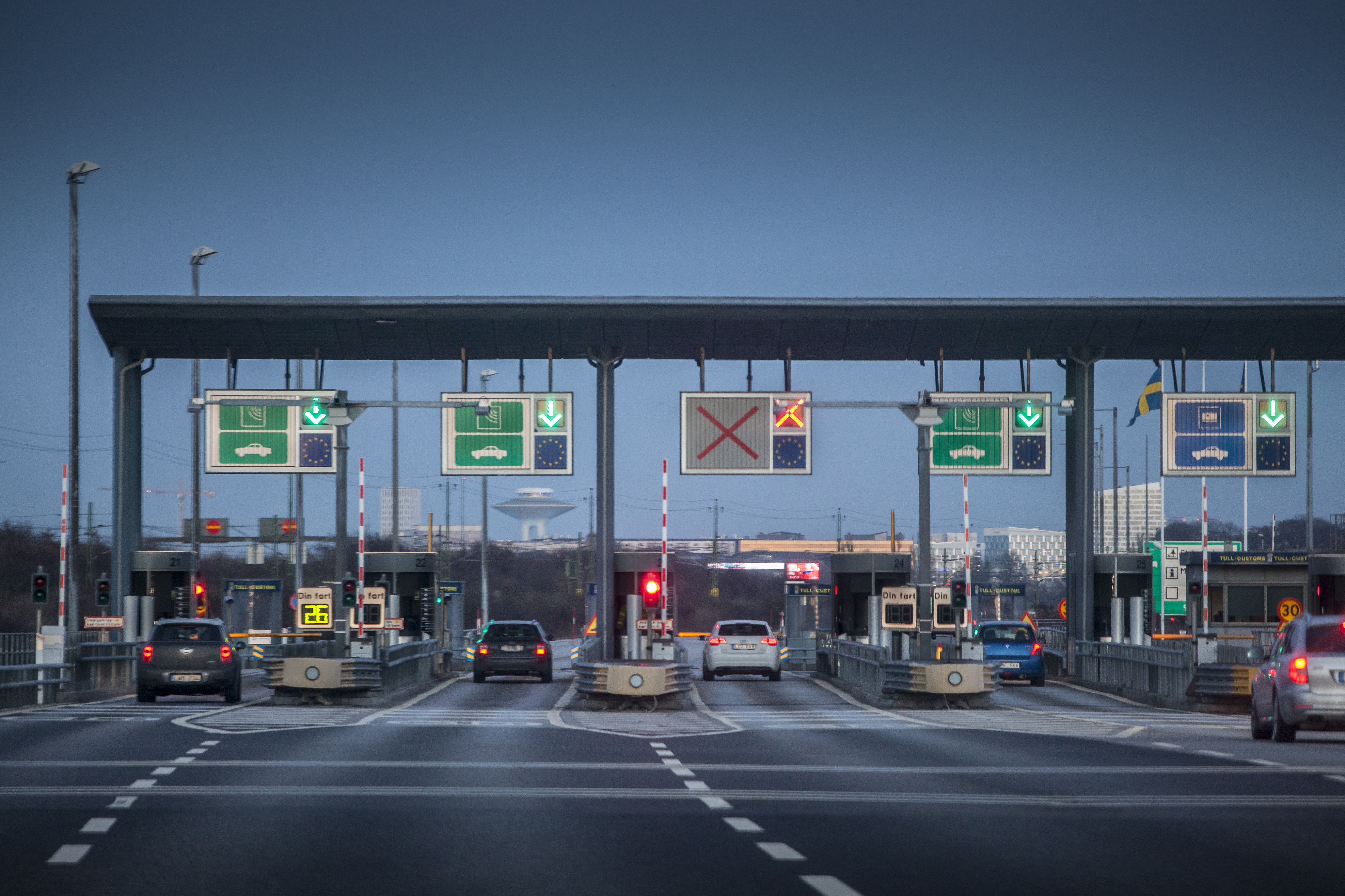 Öresundsbrons betalstation vid Lernacken i Malmö.Photo: News Öresund - Johan Wessman © News Öresund(CC BY 3.0)Detta verk av News Öresund är licensierat under en Creative Commons Erkännande 3.0 Unported-licens (CC BY 3.0). Bilden får fritt publiceras under förutsättning att källa anges. The picture can be used freely under the prerequisite that the source is given. News Öresund, Malmö, Sweden. Öresund är en oberoende regional nyhetsbyrå som är en del av det dansk-svenska kunskapscentrat Öresundsinstituttet.